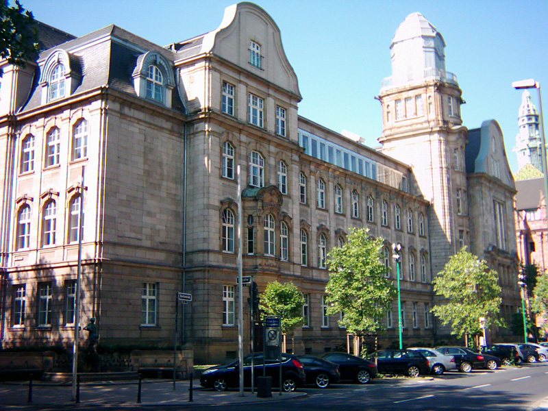 Die Fassade des Görres-Gymnasiums in Düsseldorf ist zur Bastionstraße orientiert. An der Ecke links im Bild das Gebäude zur Königsallee hin. Der viergeschossige neubarocke Bau wurde von Johannes Radke 1906 errichtet. An der Ecke Bastionstraße/Königsalle der Neckerei-Brunnen von Gregor von Bochmann d. J. von 1909.